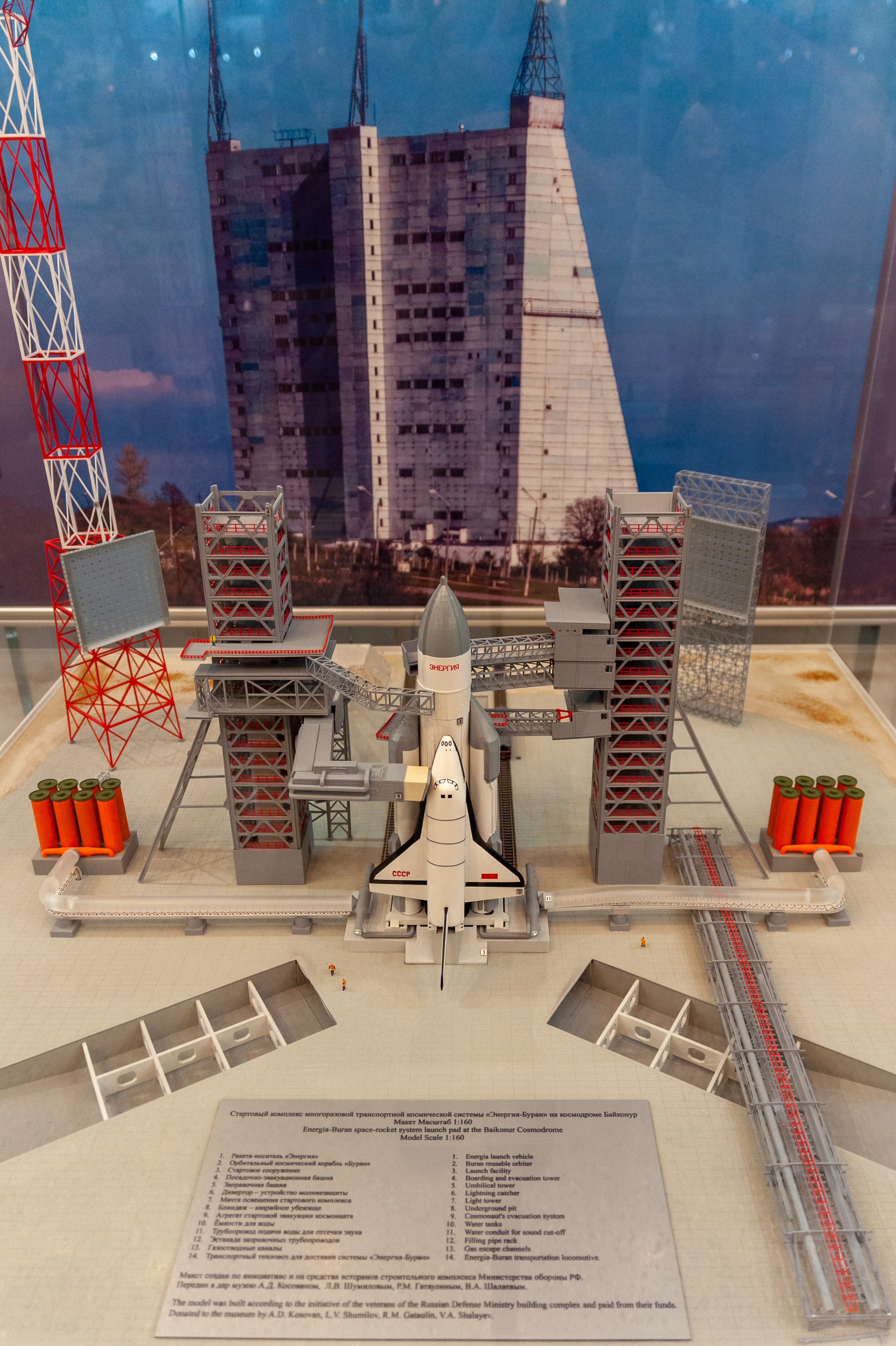 Maquette Energia-Buran au musée central des forces armées russes